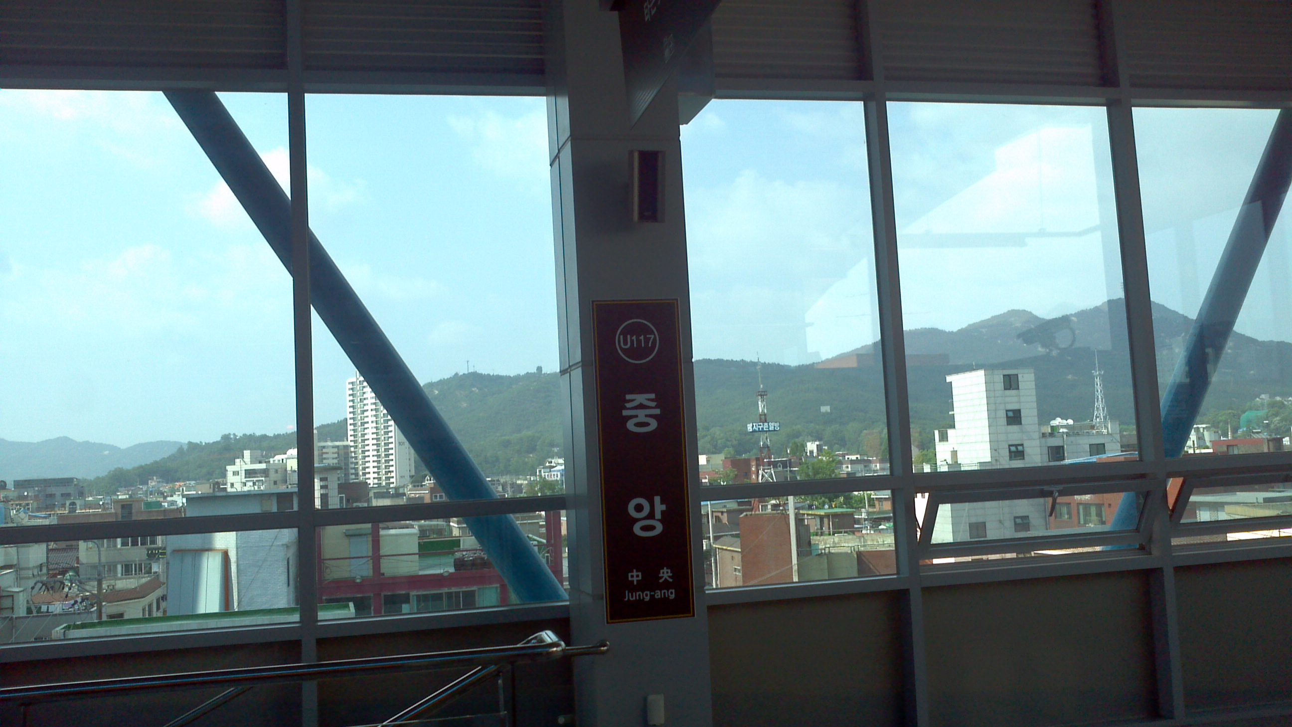 훙선역 역명판